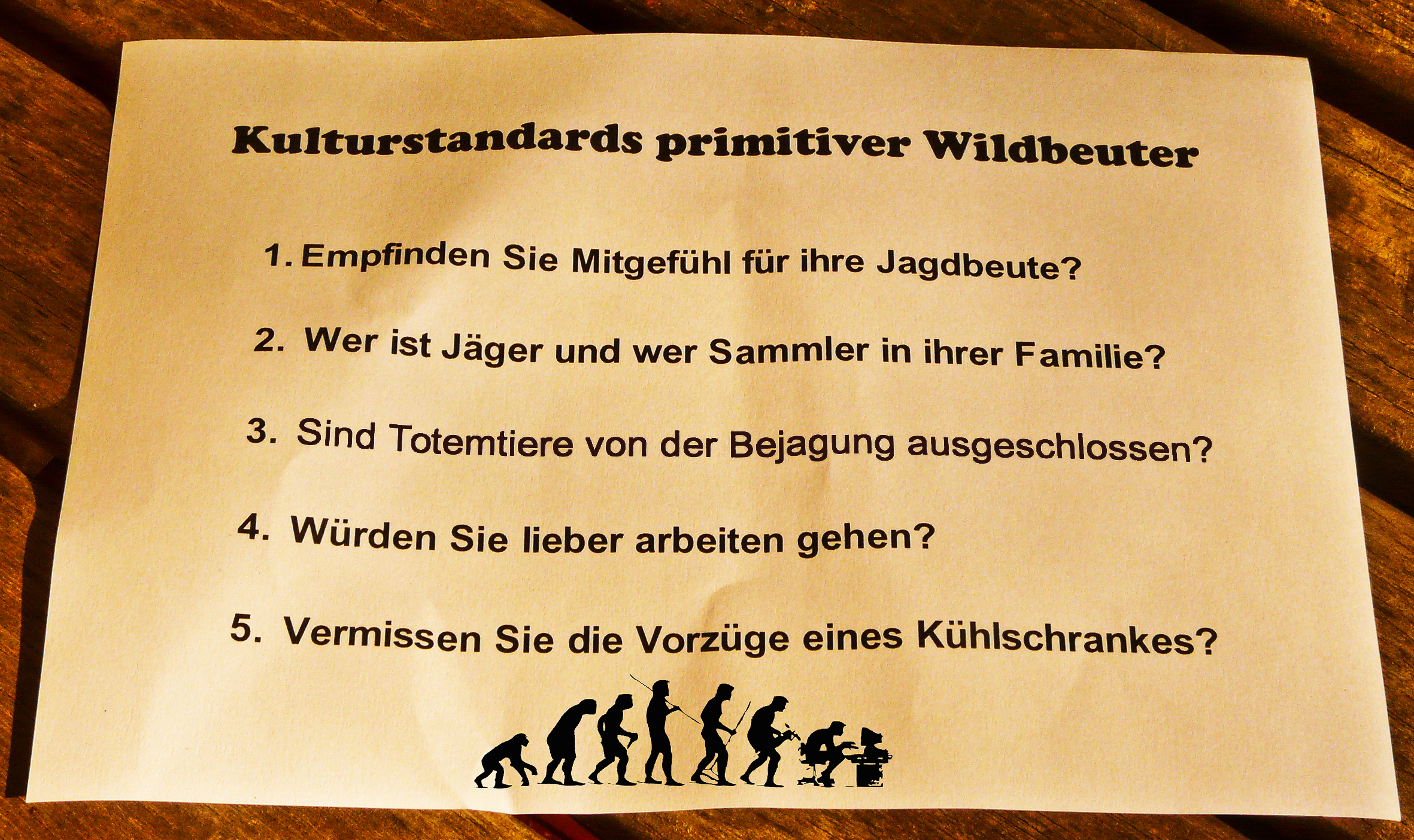 Fingierter, humorvoller Fragebogen zur kritischen Beleuchtung des Themas Kulturstandards